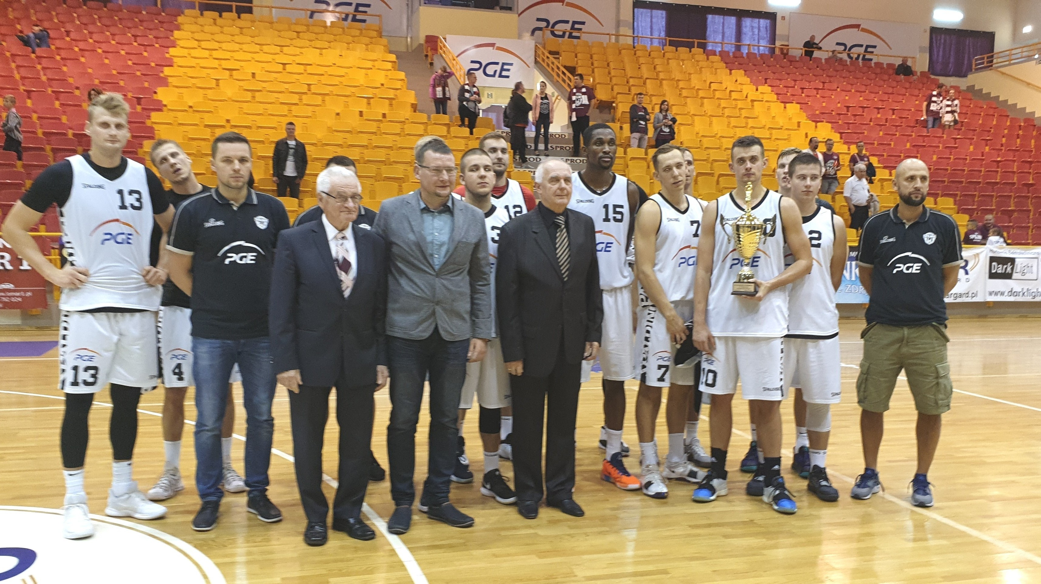 70-lecie Spójni Stargard. Memoriał Wysockiego